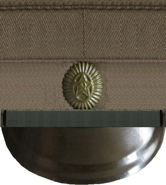 ФУРАЖКА ПОЛЕВАЯ